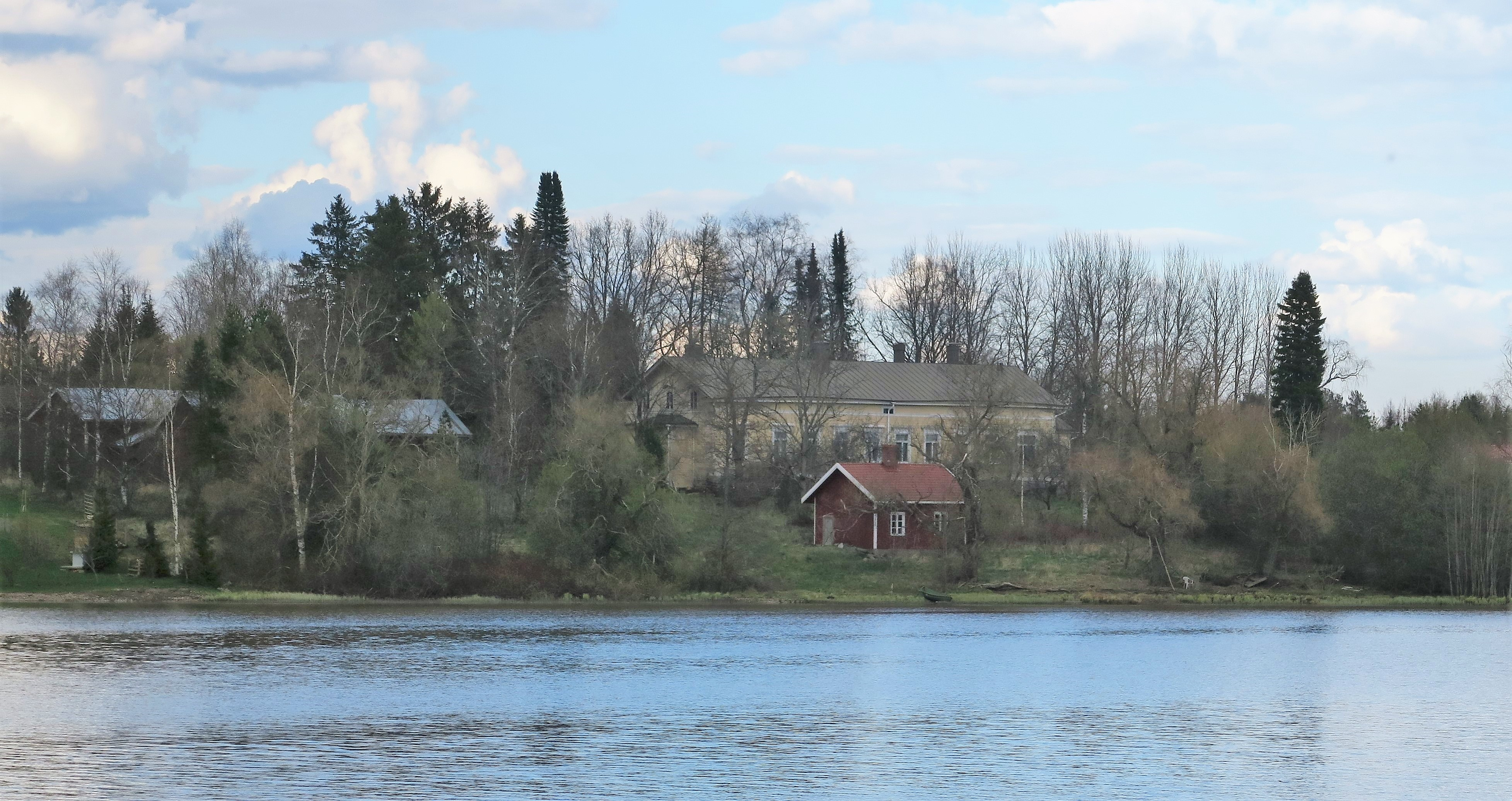 Someron pappila nähtynä Kirkkojärven etelärannalta toukokuussa 2020